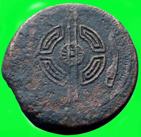 Cruz de dupondio de LUCUS AUGUSTI